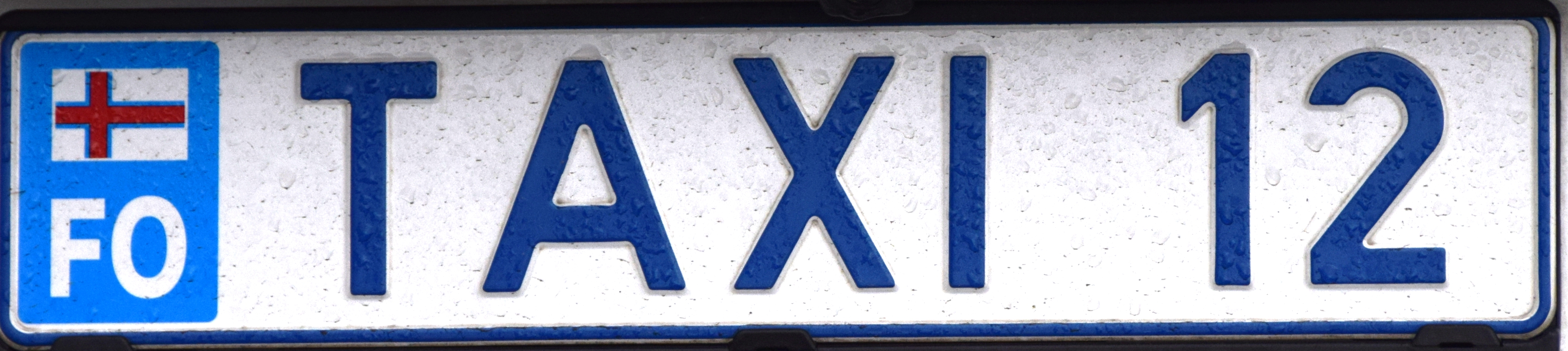 Faeröer persoonlijk kentekenplaat